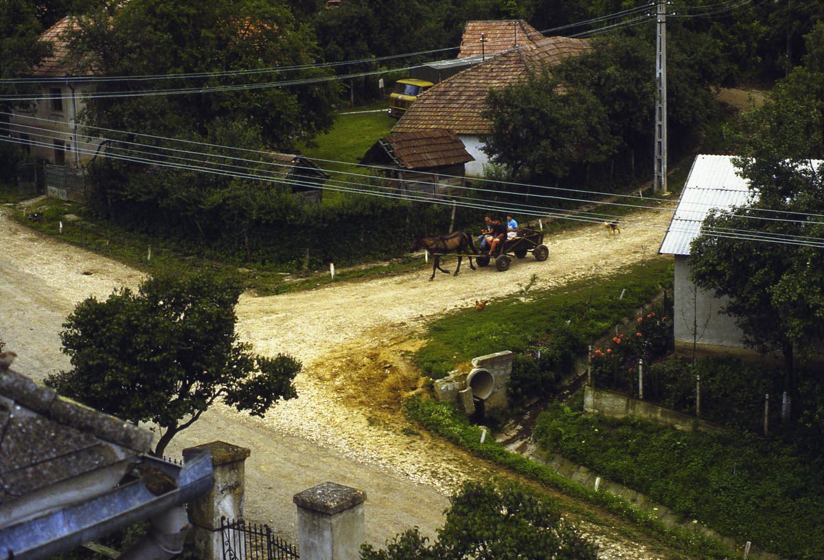 Lelei, deel van Hodod, Roemenië